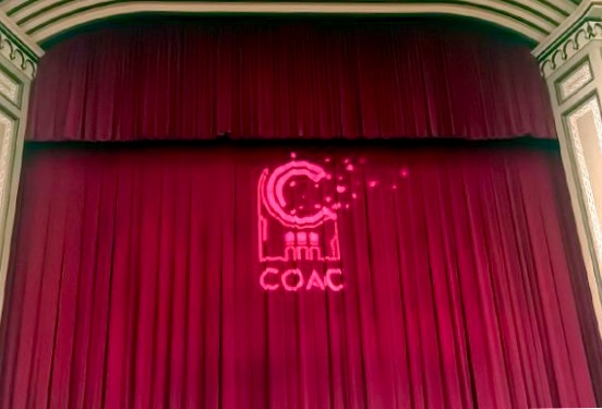 Telon COAC